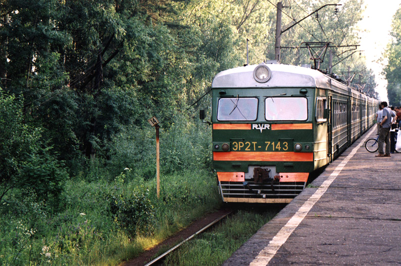 Электропоезд ЭР2Т-7143 Платф. Барвиха